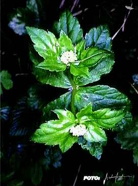 Sicilian botanical endemisms Petagnia saniculaefolia